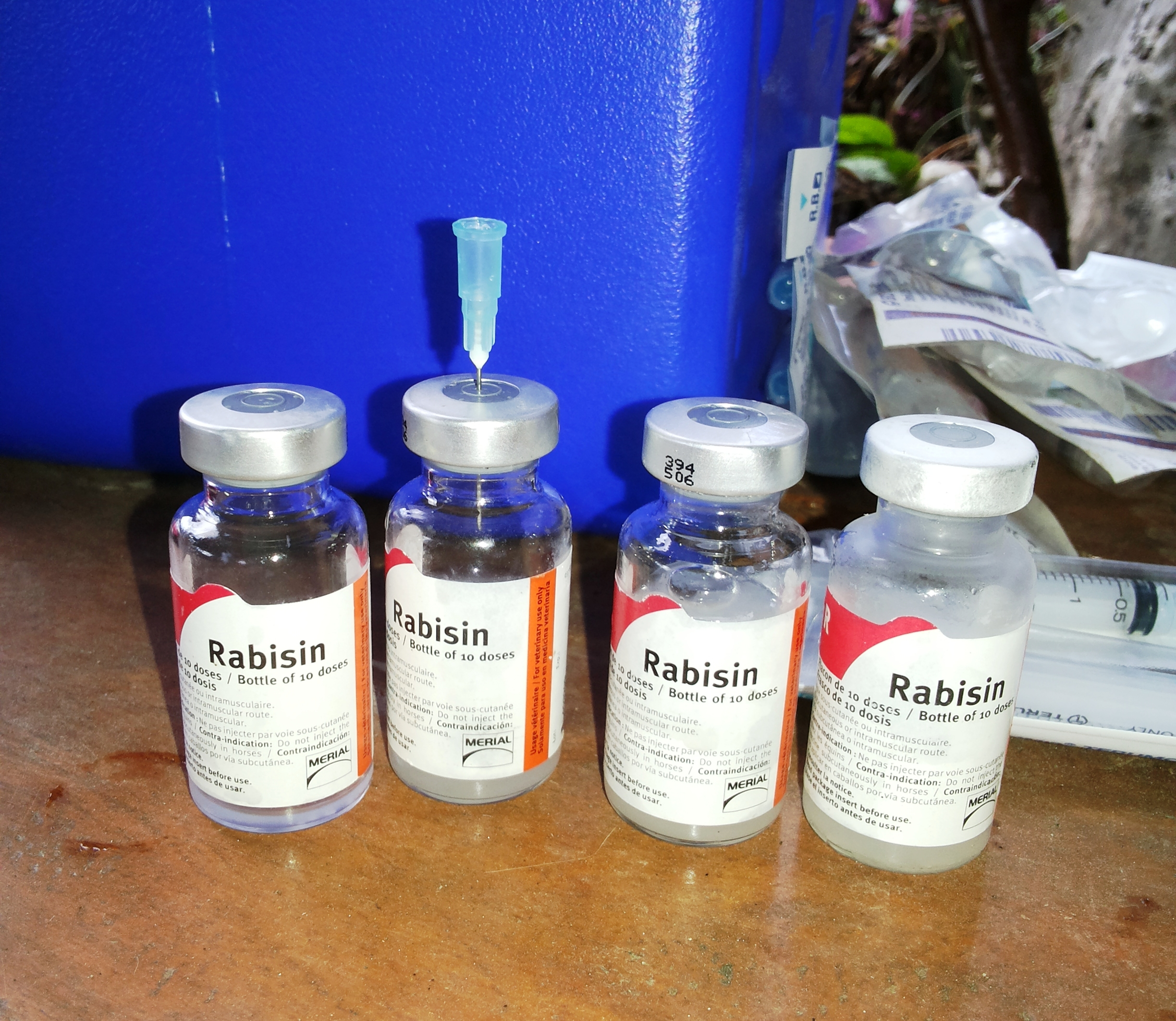 Bikol Central: Bakuna laban sa rabies